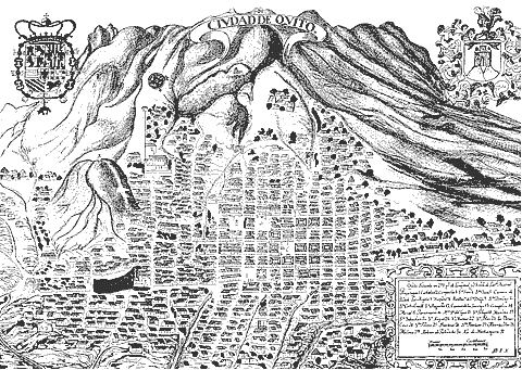 Virgen del Panecillo, Quito.